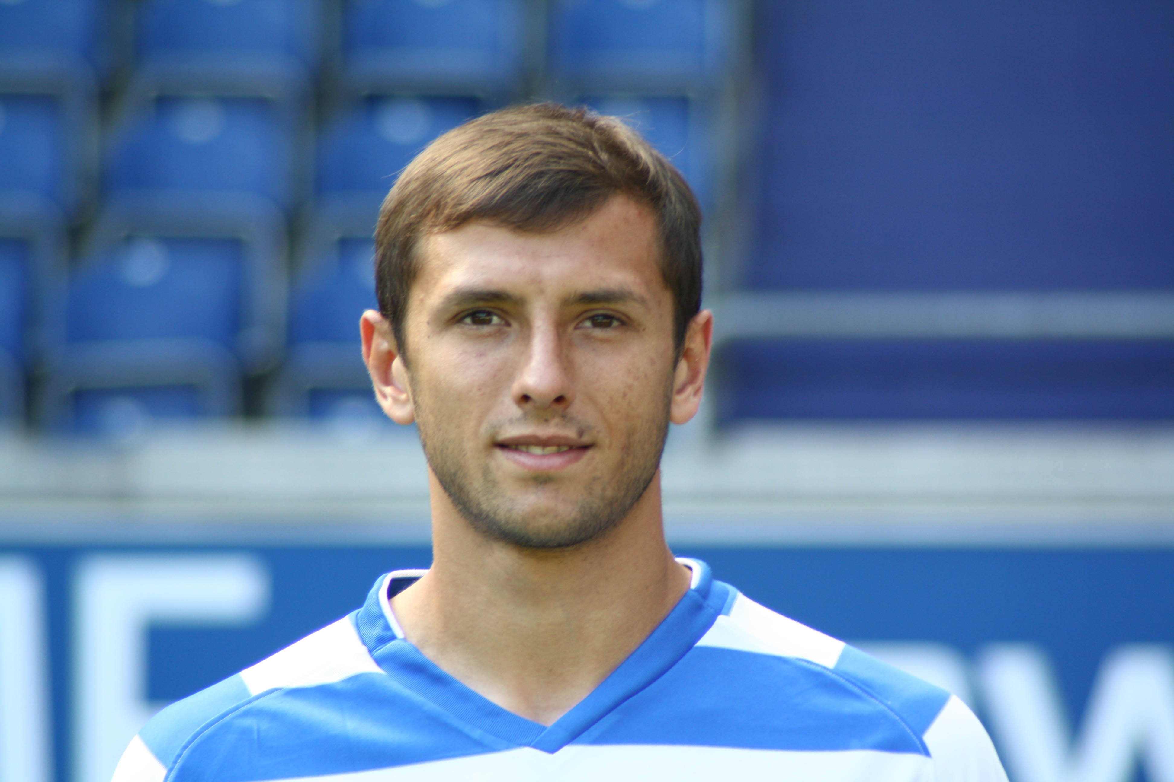 Sergej Karimow, MSV Duisburg